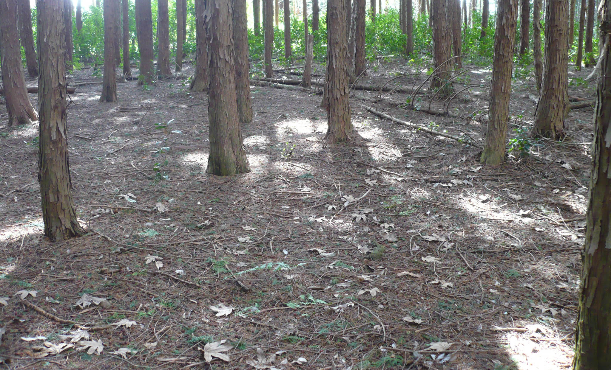 主郭